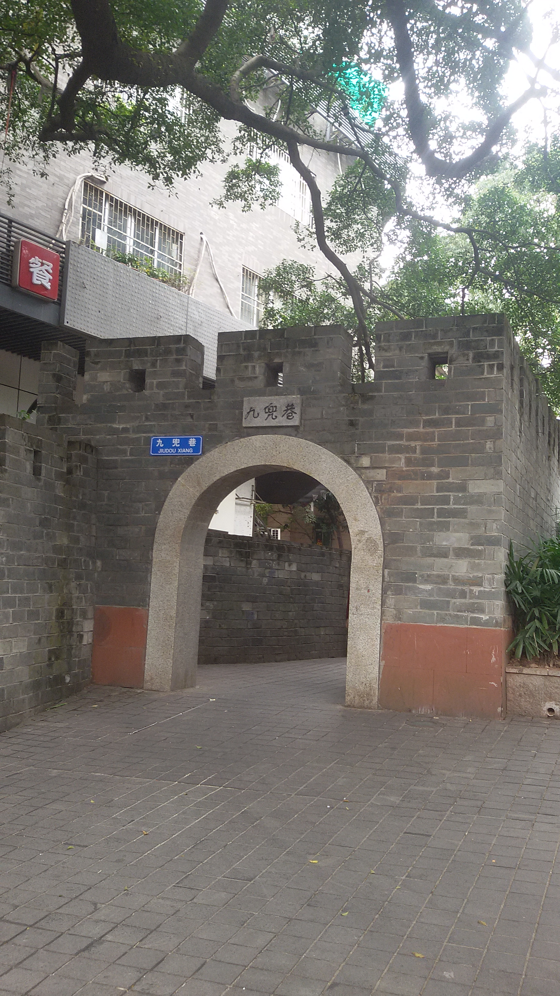 粵語: 廣州市越秀區小北路九兜巷